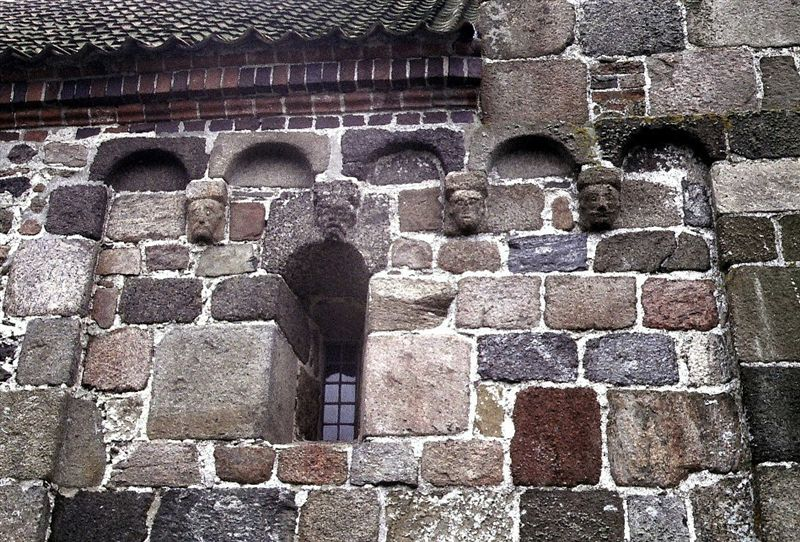 Lihme Kirke, (Skive Kommune), Buefrise på skibets nordmur